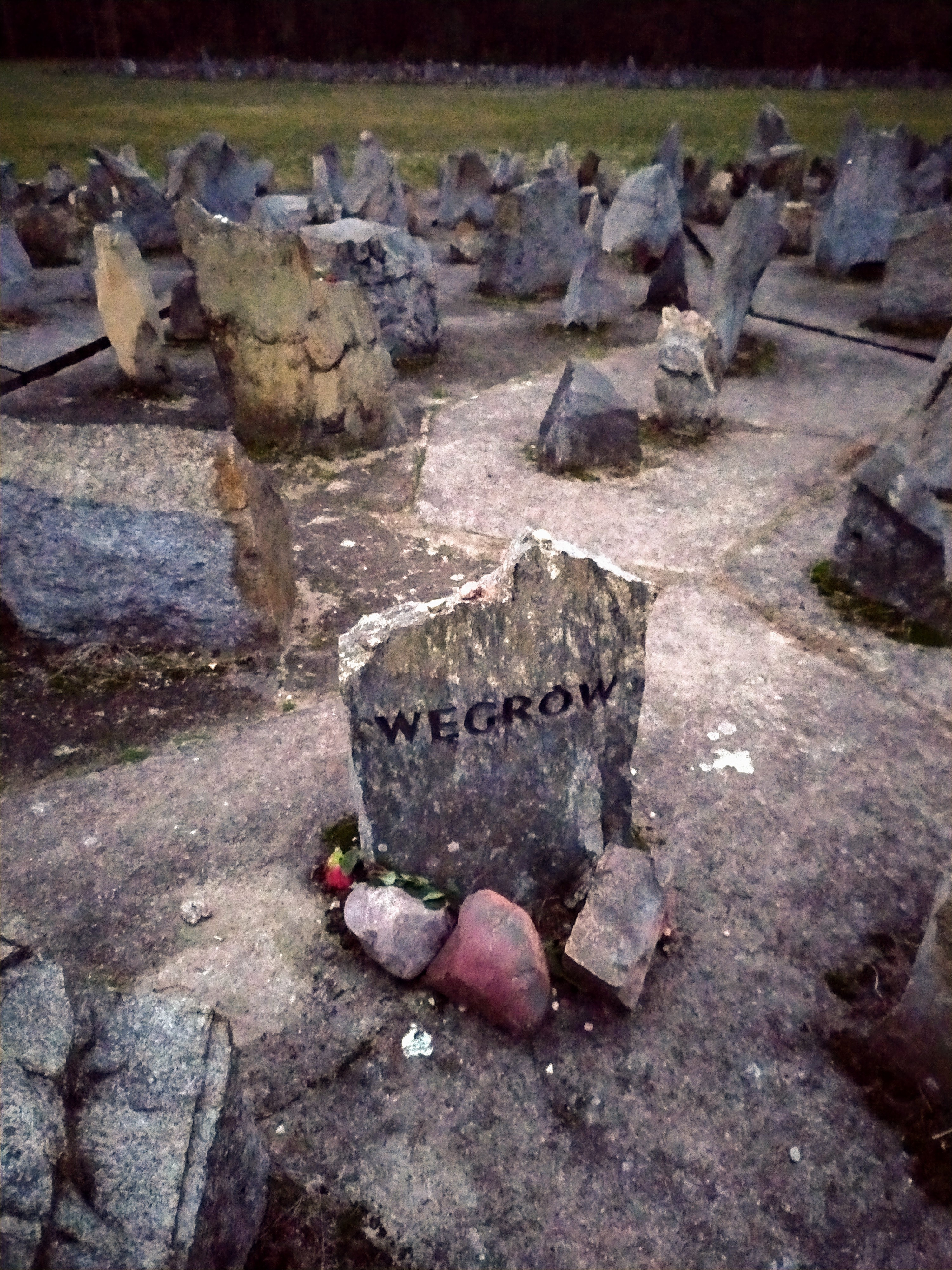 מצבת ונגרוב בטרבלינקה